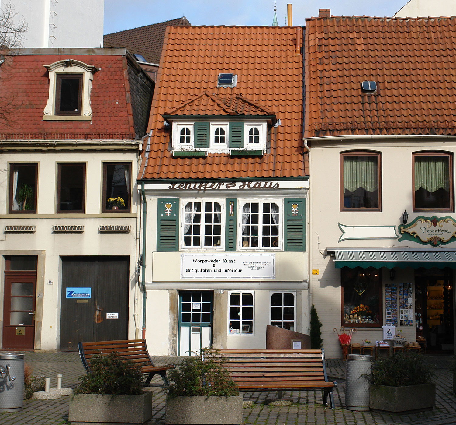 Bremen: Schifferhaus im Schnoor. Erbaut 1630, erweitert 1750Das abgebildete Objekt ist ein geschütztes Kulturdenkmal in der Freien Hansestadt Bremen, mit der Nr. 1373 beim Landesamt für Denkmalpflege registriert.